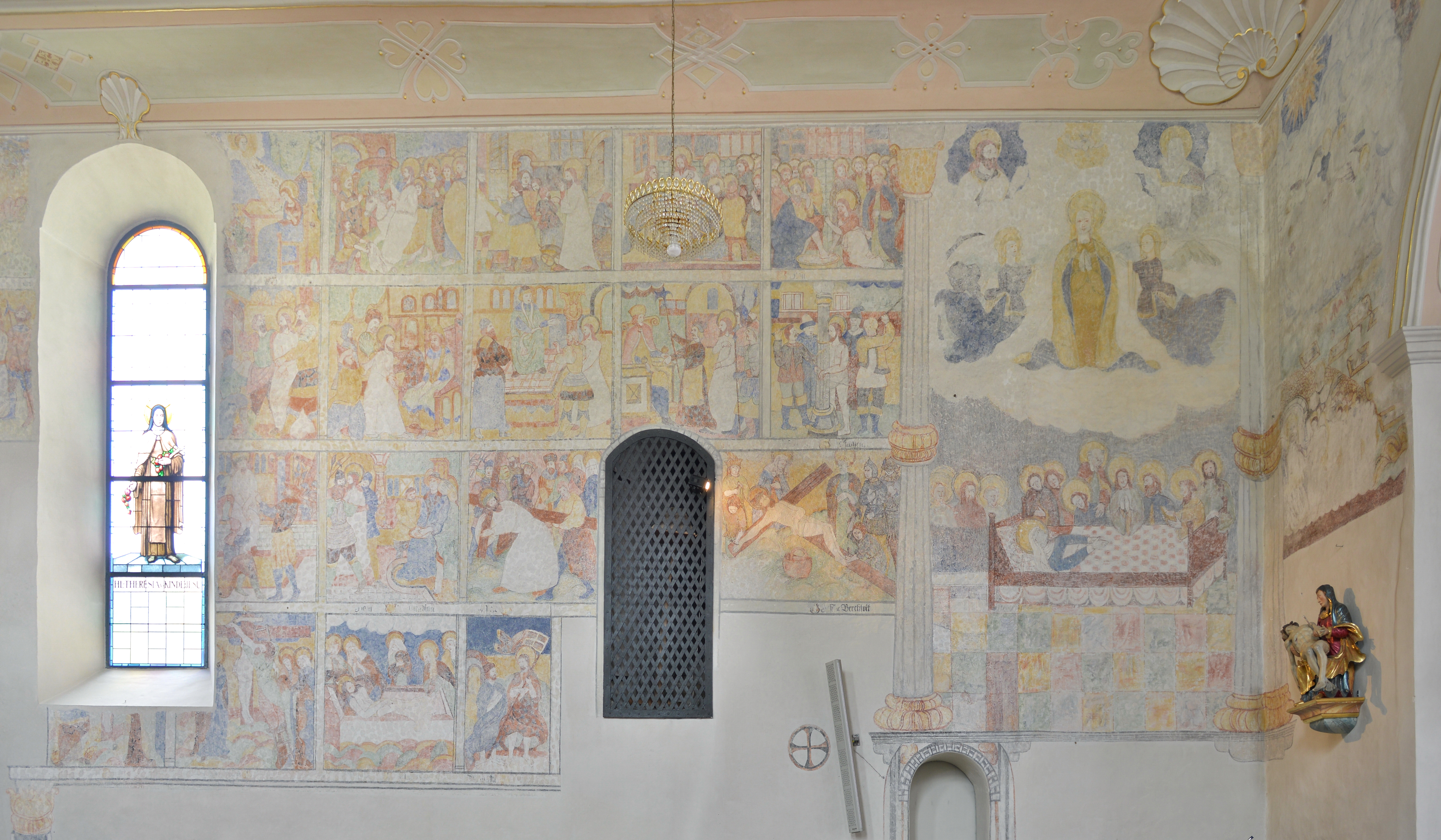 Katholische Pfarrkirche St. Jodok in Mittelberg, Kleinwalsertal.